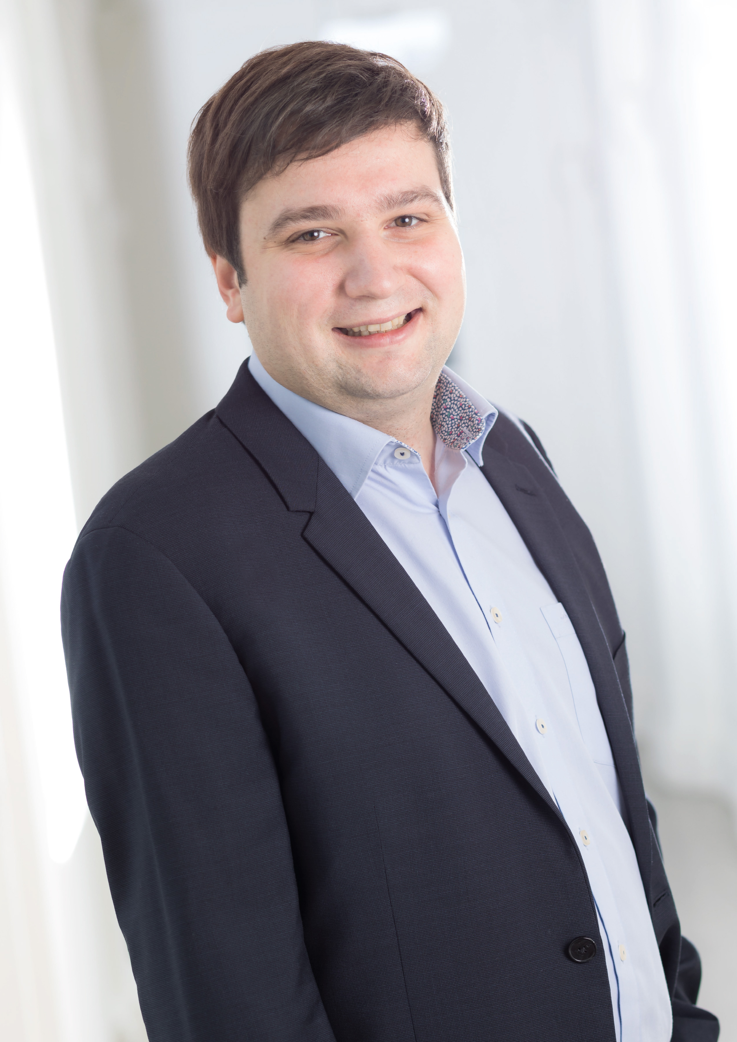 LA Benedikt Lentsch